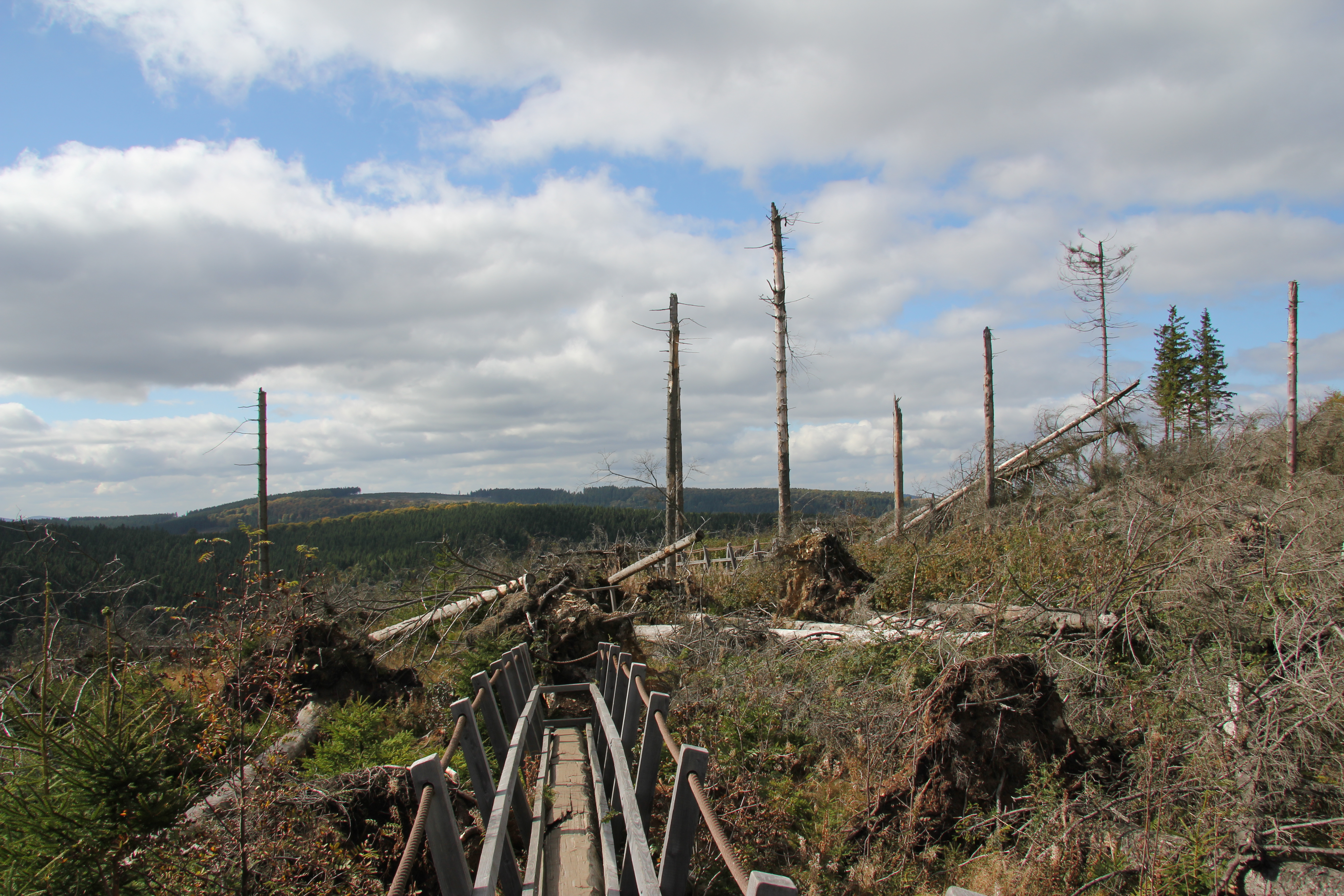 Kyrillpfad auf dem Ettelsberg